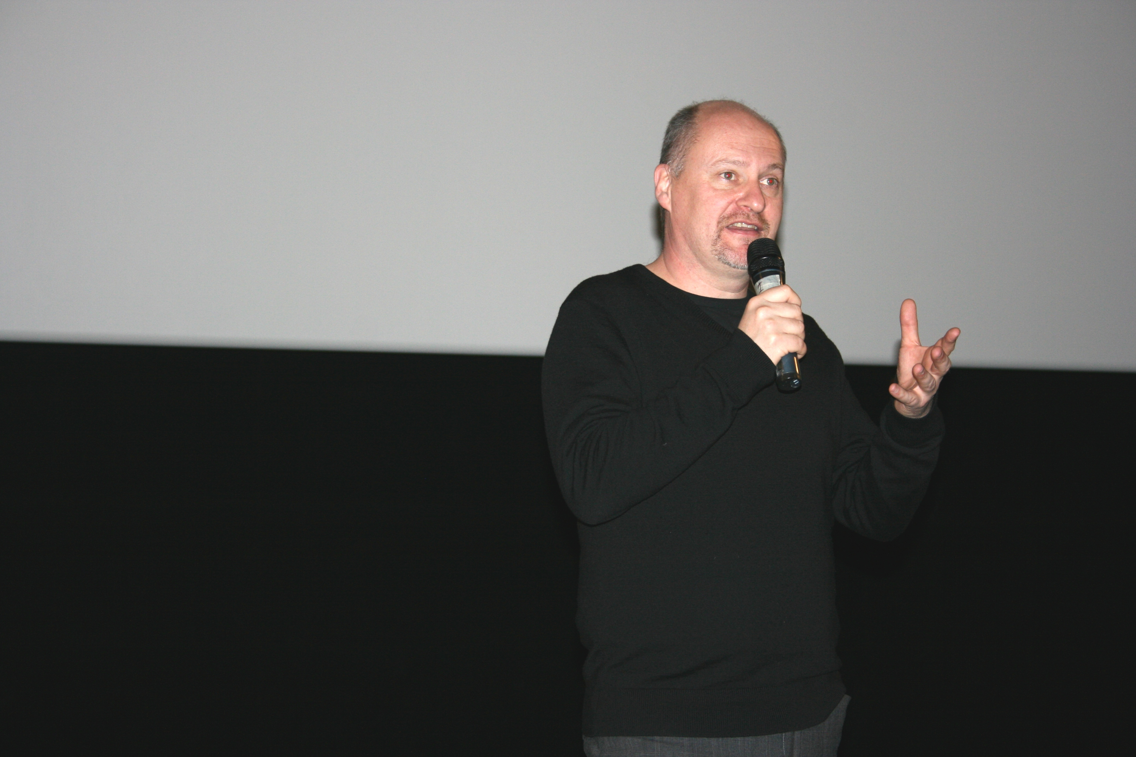 Jean-Paul Salomé à l'avant-première des Femmes de l'ombre diffusée à l'UGC Ciné Cité Les Halles, à Paris.